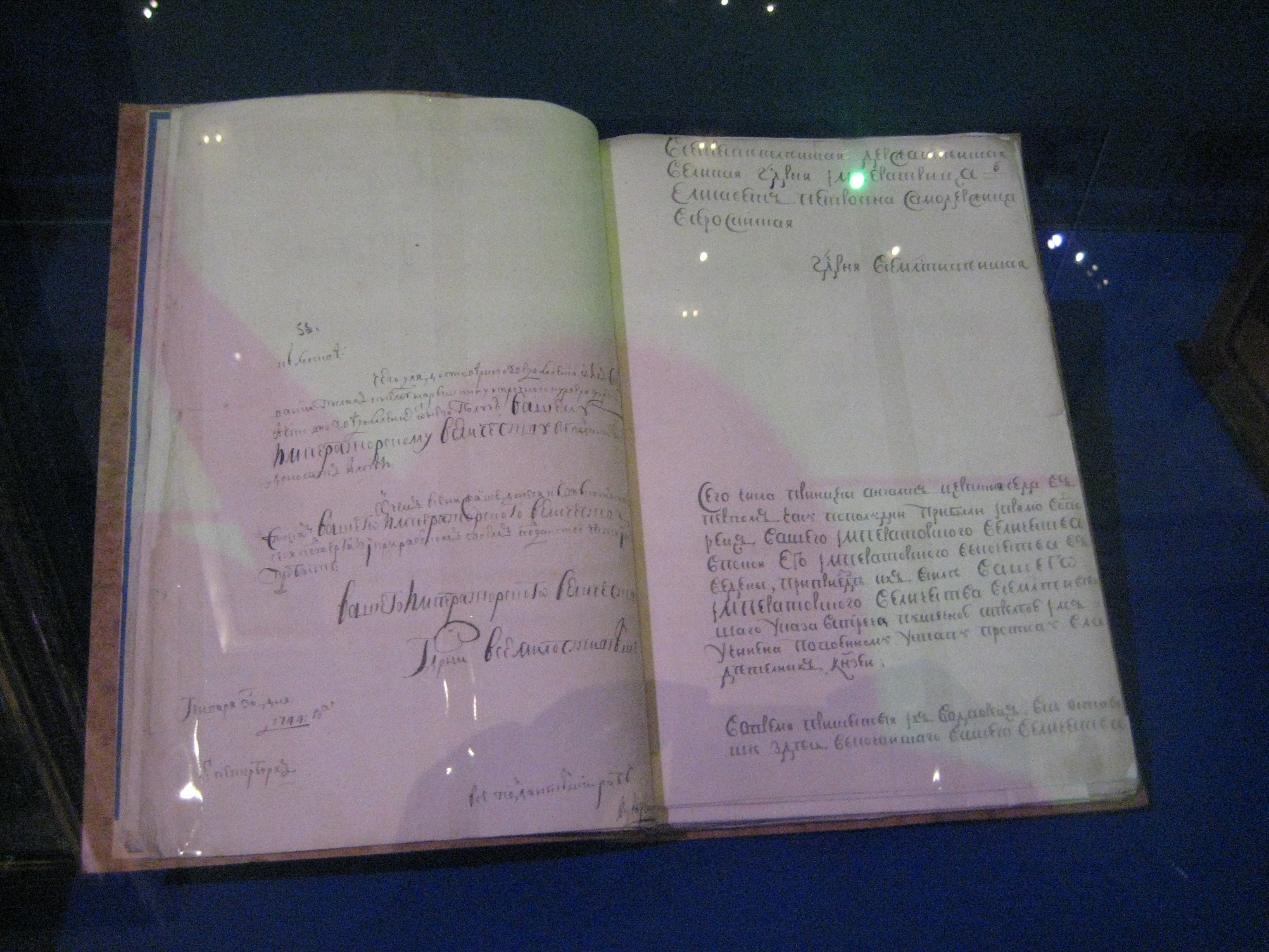 Доношение князя Василия Аникитича Репнина Елизавете Петровне о прибытии в Россию принцессы Иоганны Елизаветы Ангальт-Цербской с дочерью Софией. 3 февраля 1744. Автограф. РГАДА.